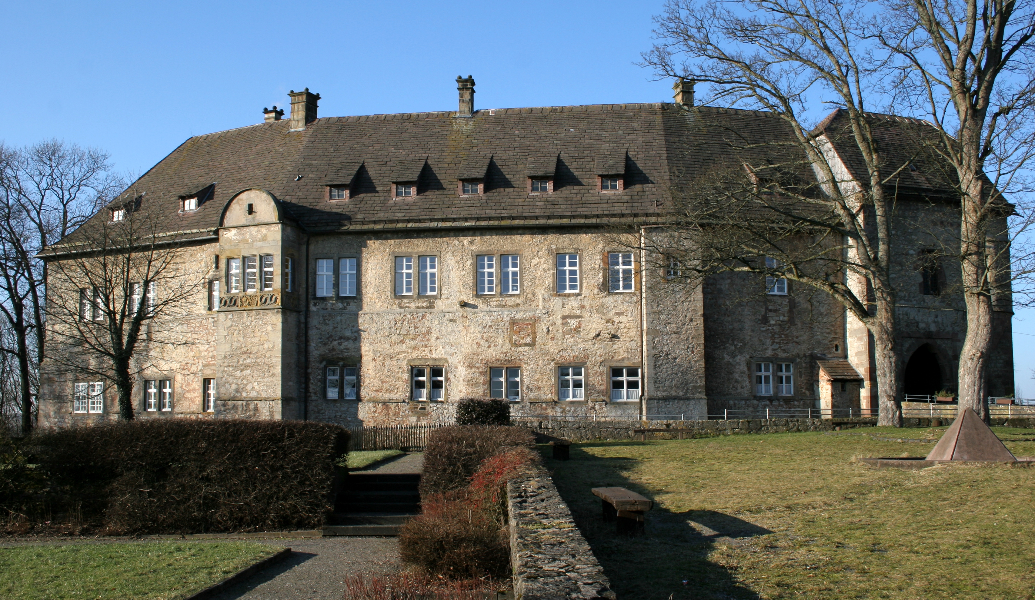 Burg Dringenberg in Dringenberg, Bad Driburg, NRW, Deutschland